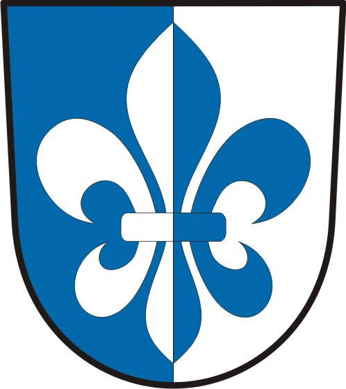 Pohnání